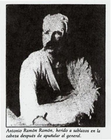 Antonio Ramón Ramón, herido a sablazos en la cabeza después de apuñalar al general Silva Renard (1914).